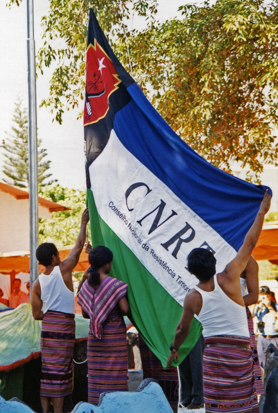 CNRT-Veranstaltung zum Unabhängigkeitsreferendum in Osttimor 1999 in Dili